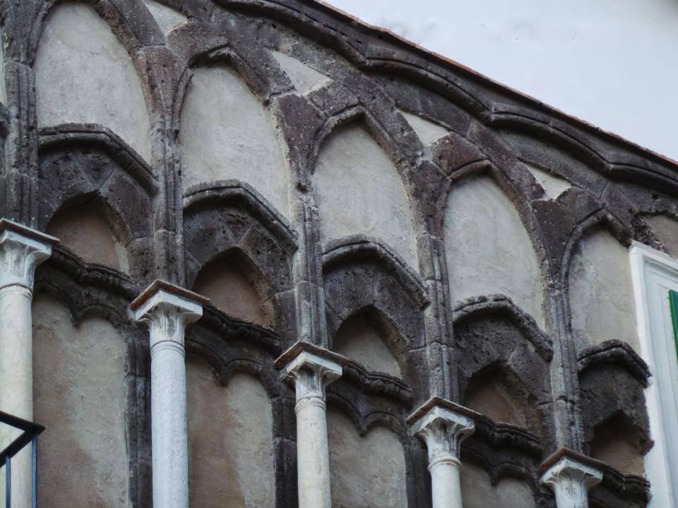 Dettaglio polifore di Palazzo Fruscione